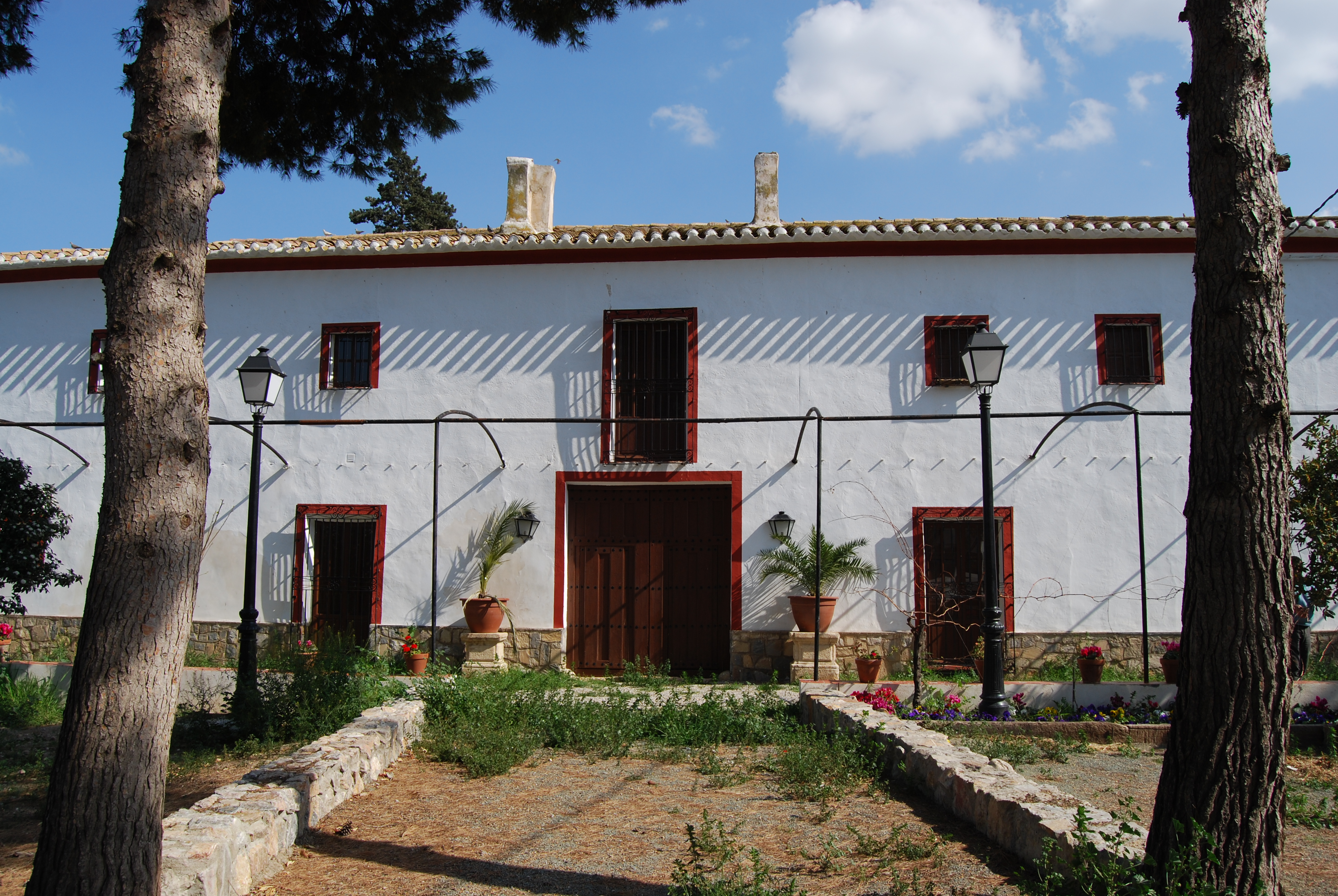 Camino acceso a entrada a edificio principal de Casa del Cura